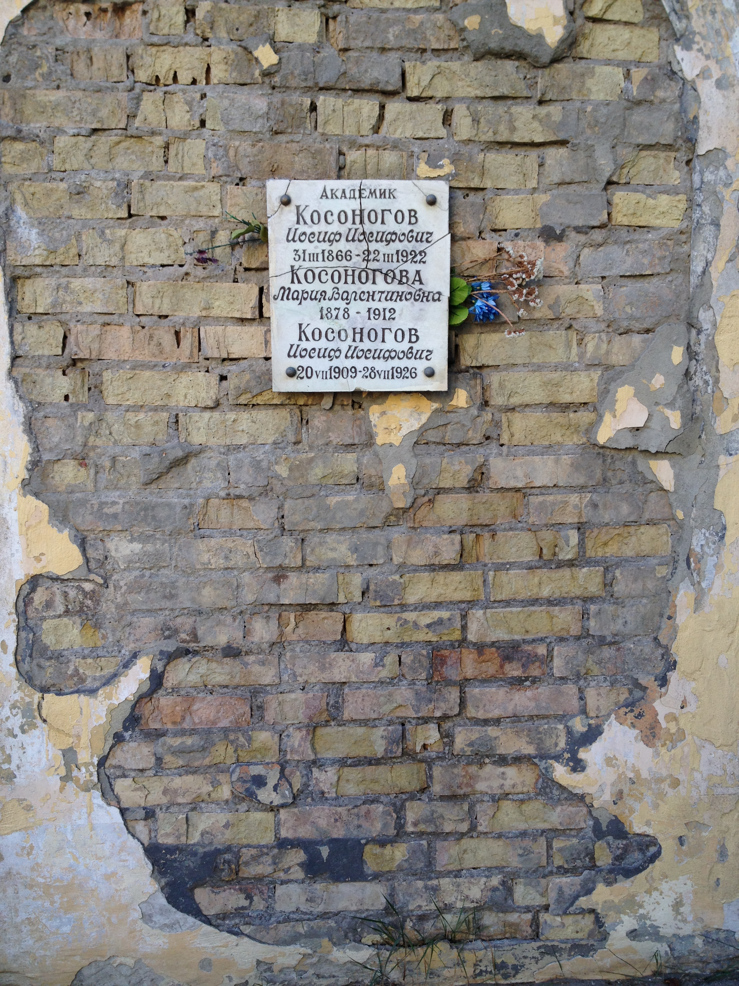 Байковое кладбище